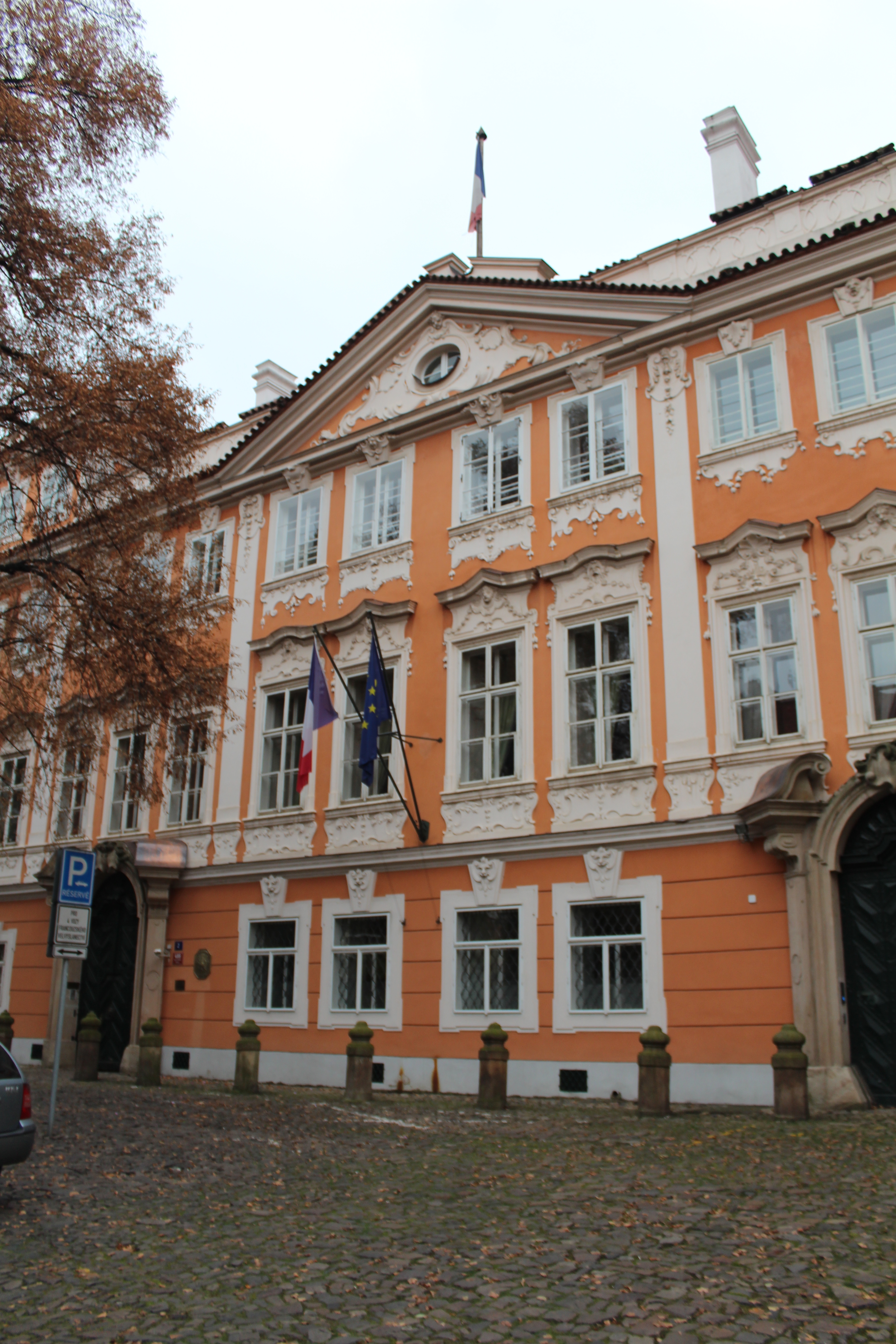 Palais Buquoy, ambassade de France à Prague.